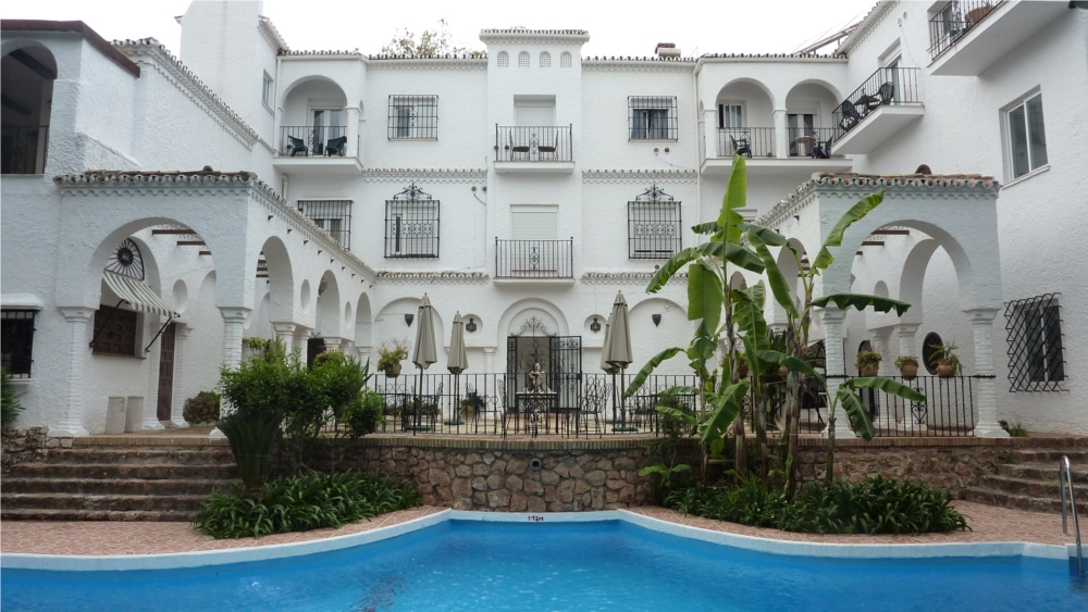 Vue de la piscine de l'édifice